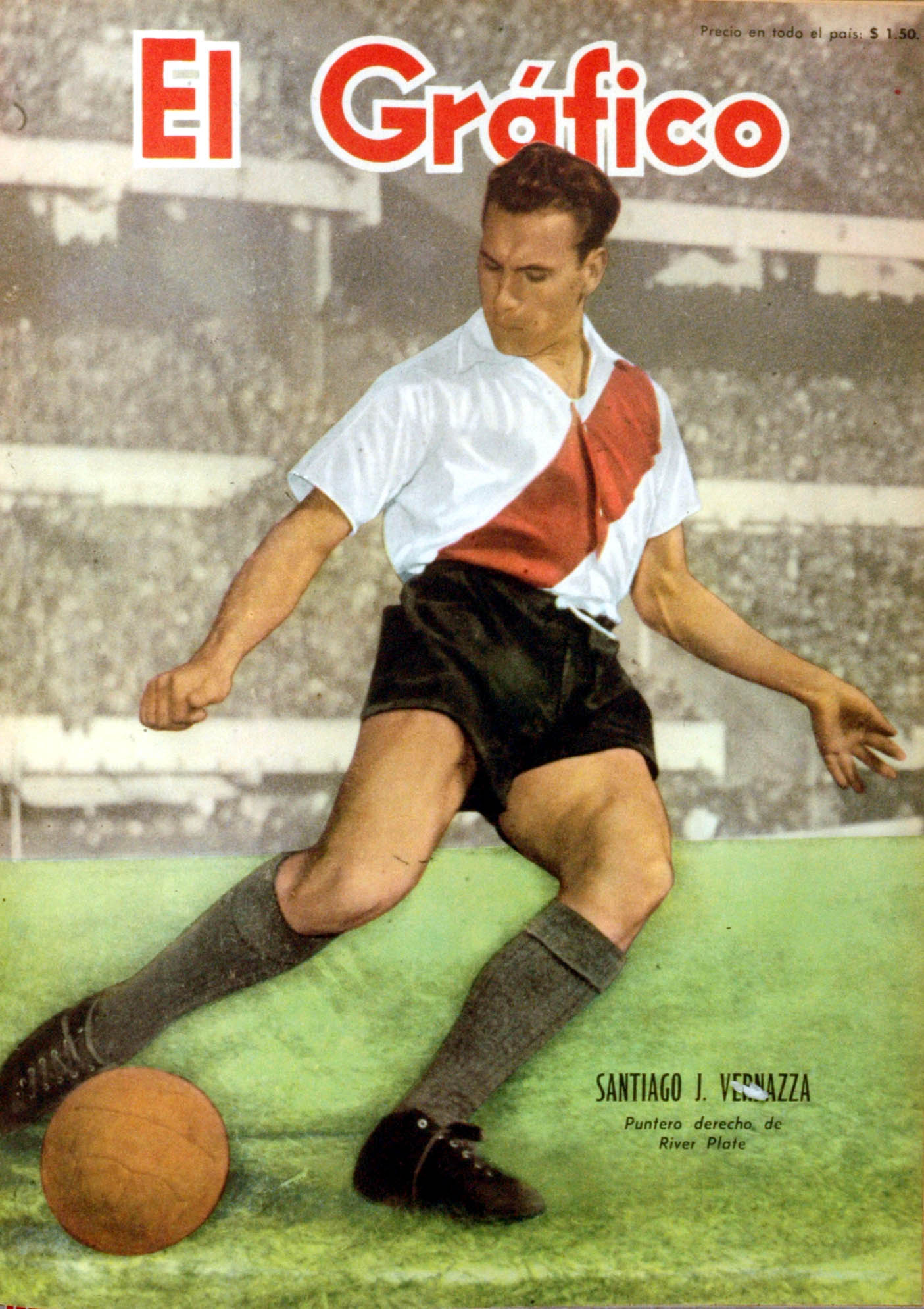 El Grafico del 31 de Octubre de 1952. Edicion 1734